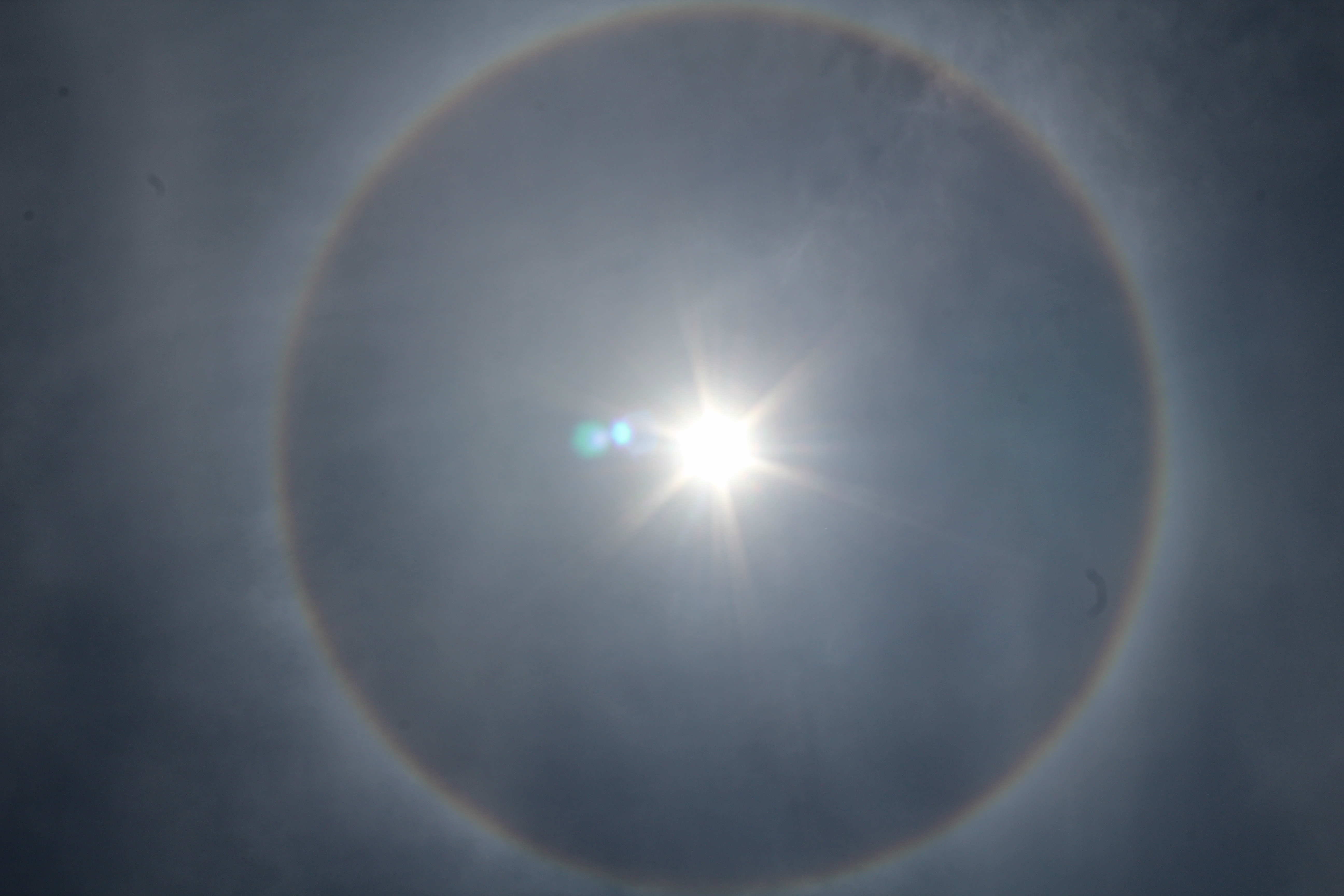 Halo en la Ciudad de México